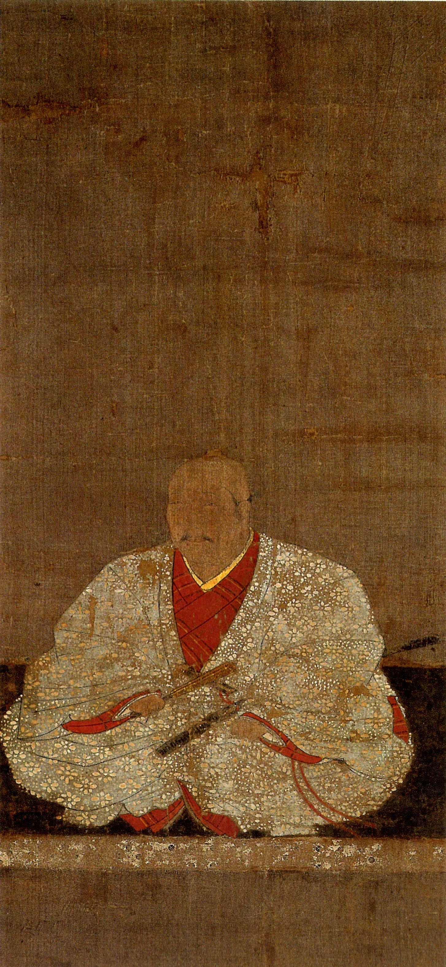 長尾政長(当長とも)の肖像。